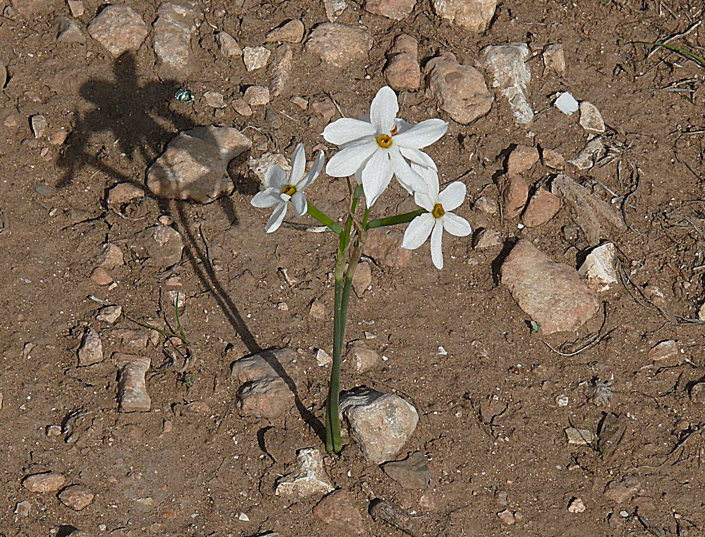 Narcissus obsoletus